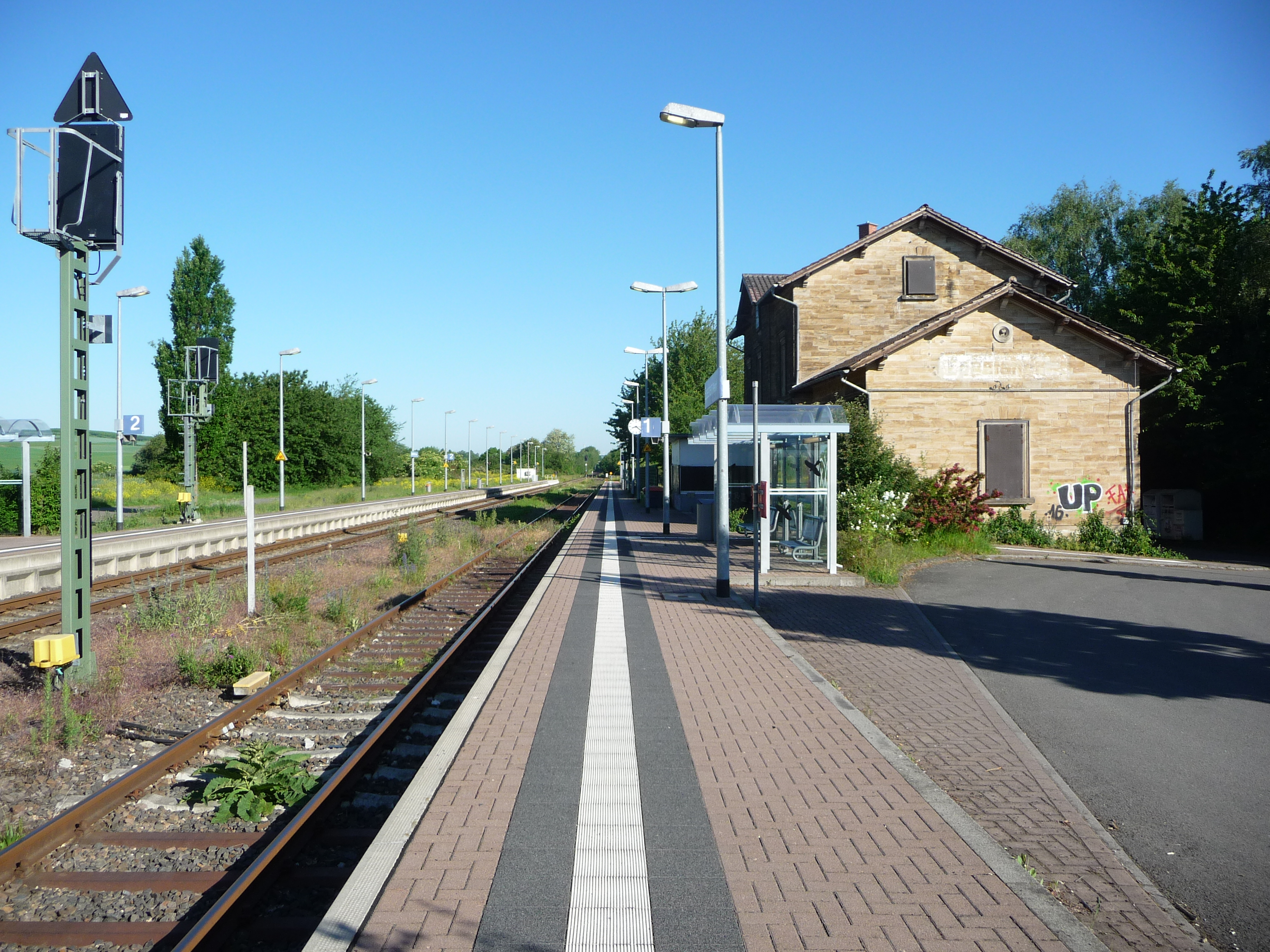 Eppelsheim ist eine Ortsgemeinde im Landkreis Alzey-Worms in Rheinland-Pfalz.